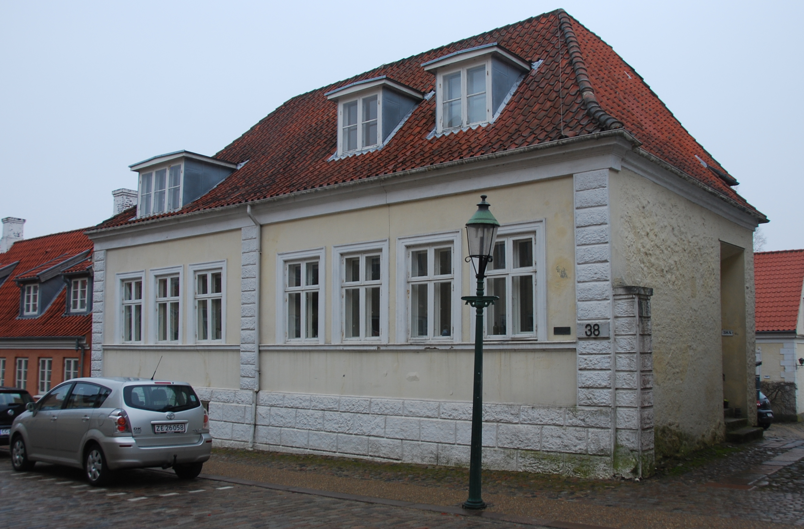 Den fredede bygning "Den gamle gildesgård" i Viborg.